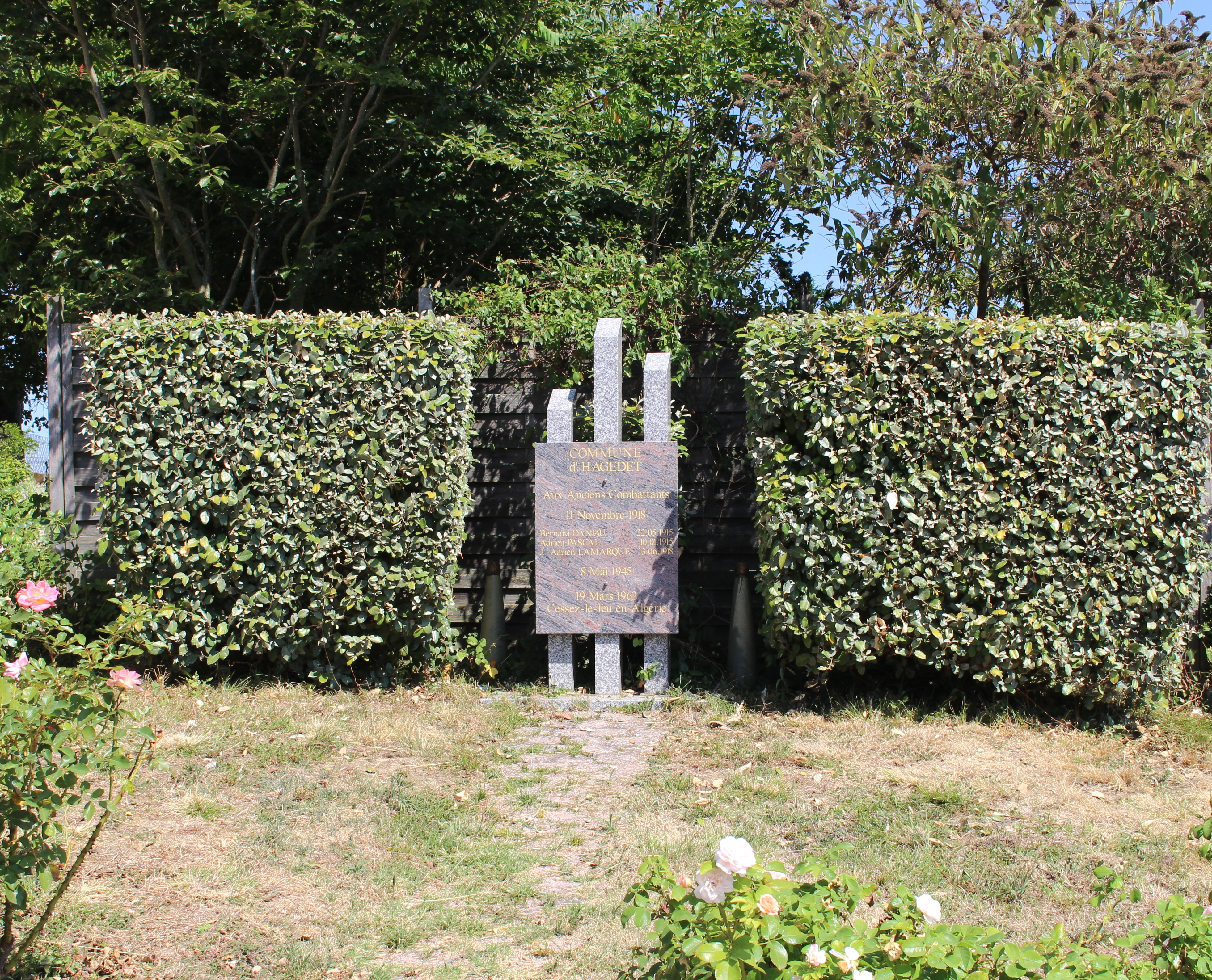 Monument aux morts de Hagedet (Hautes-Pyrénées)